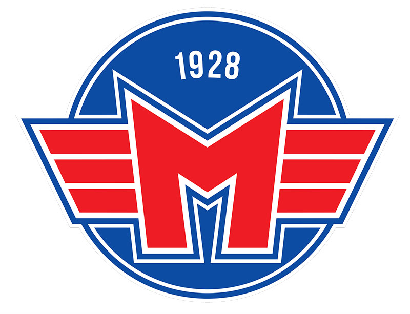 Oficiální logo ČEZ Motor České Budějovice